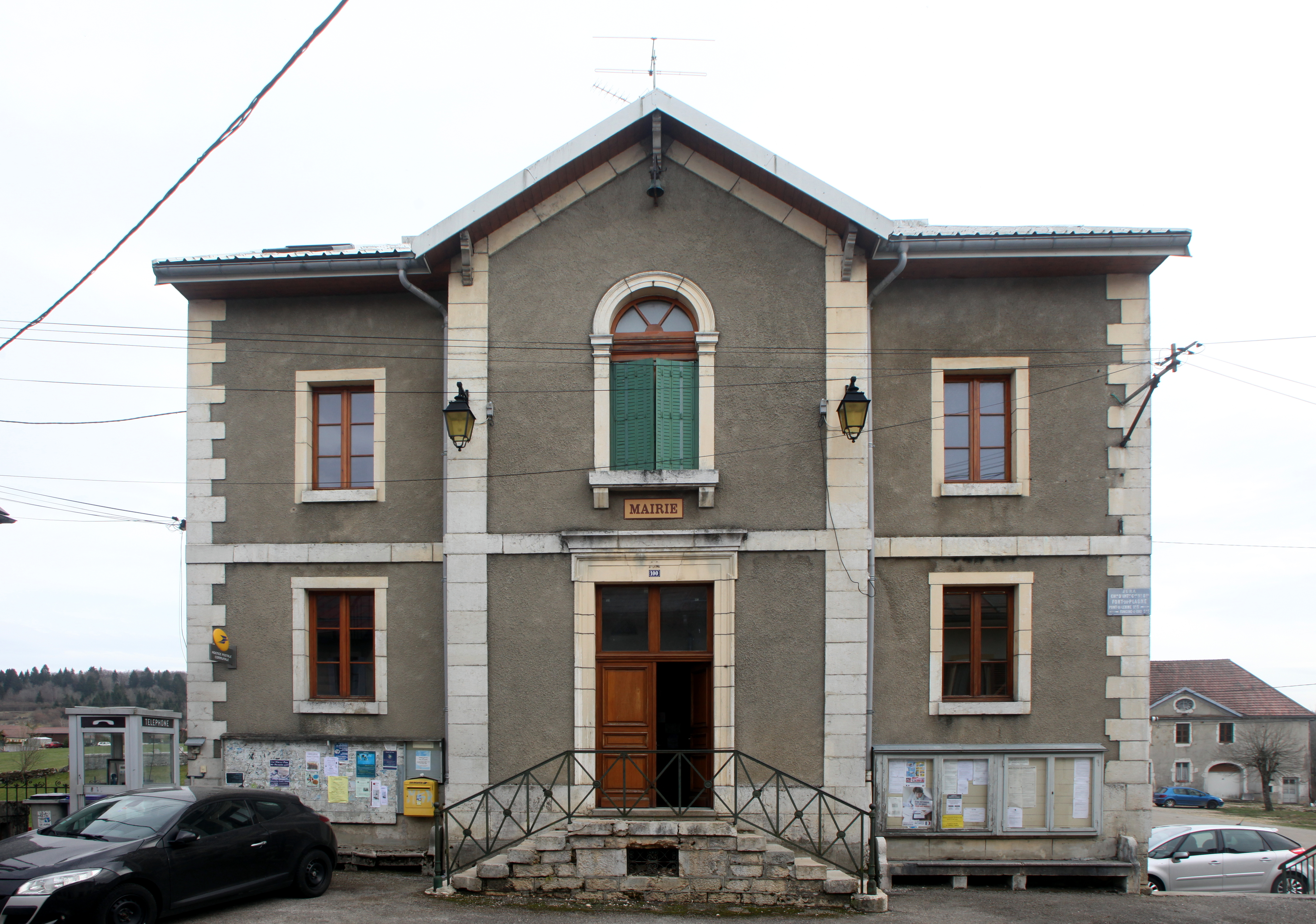 Mairie de Fort-du-Plasne (Jura).